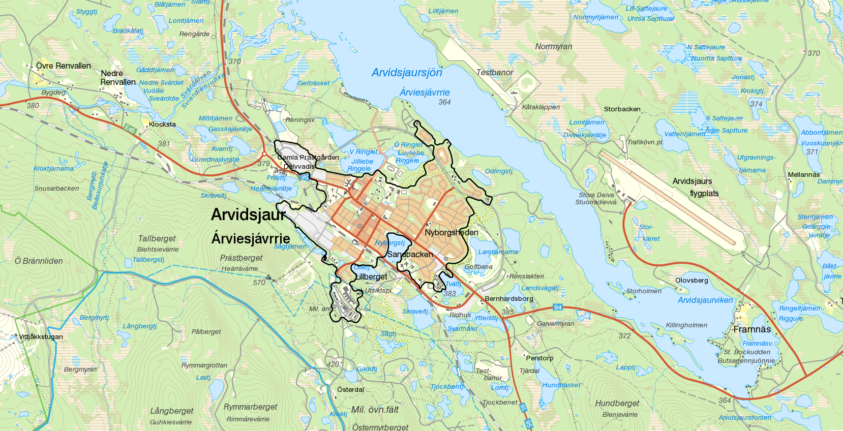 Tätorten Arvidsjaur med gränserna från Statistiska centralbyråns tätortsavgränsning 2015 i svart. Bakgrundskarta från Lantmäteriet, skala 1:30 236.